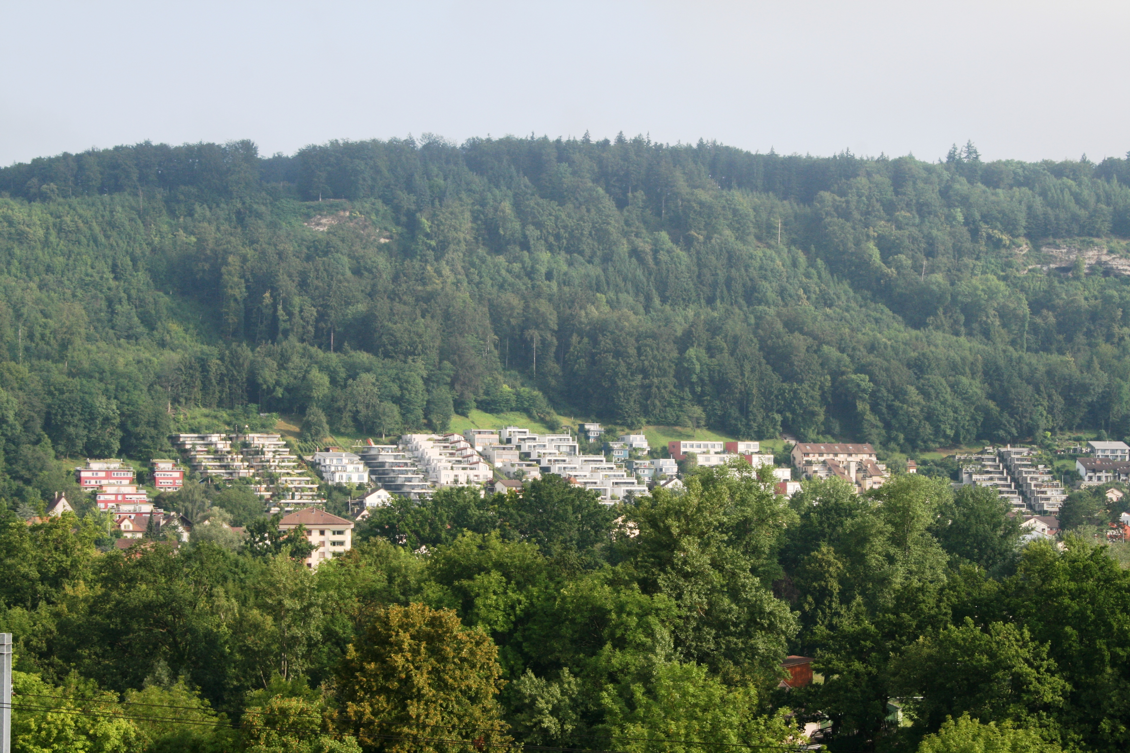 Brugg-Lauffohr, Schweiz